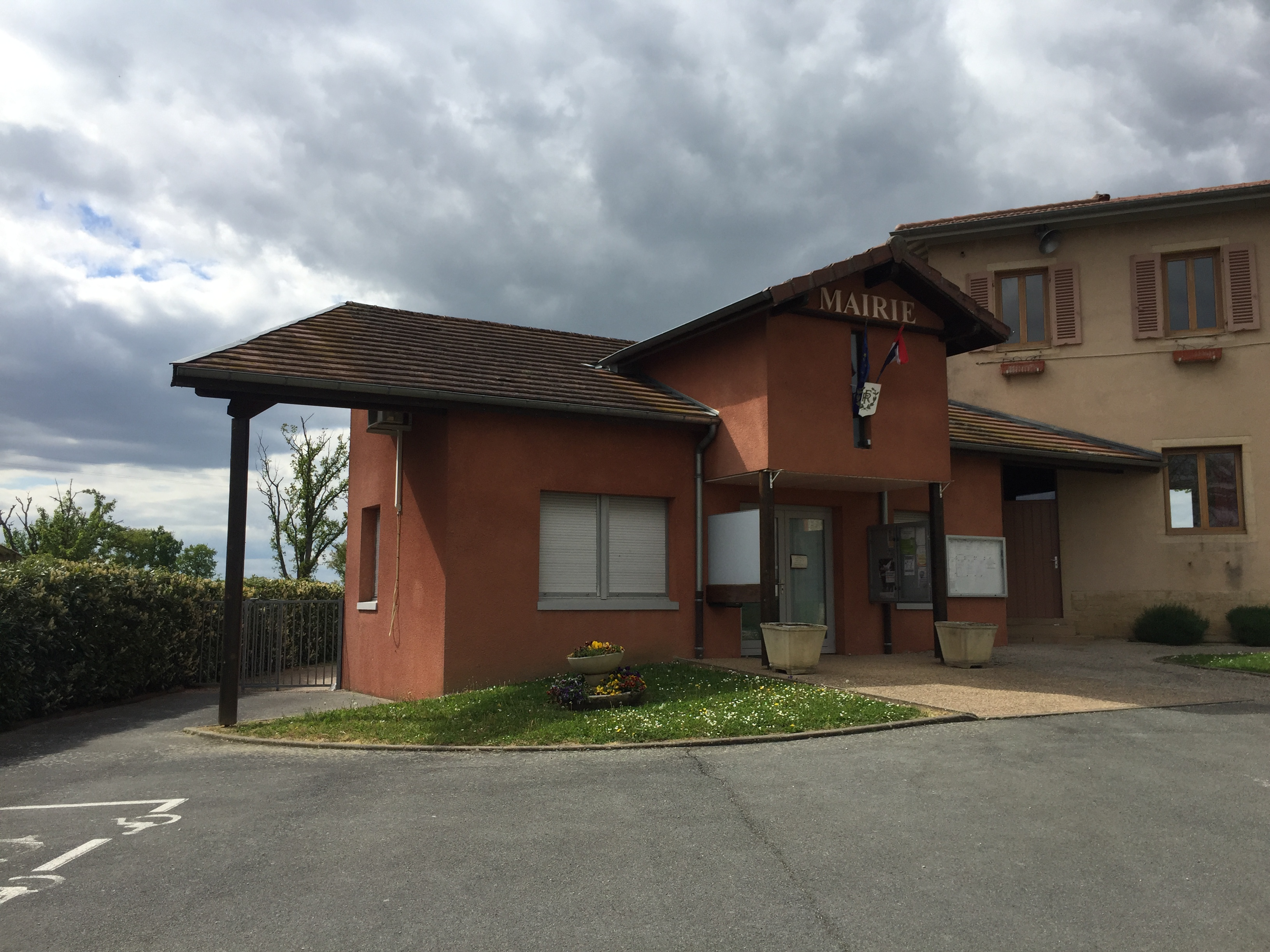 Image du village de Relevant, dans l'Ain, en France..